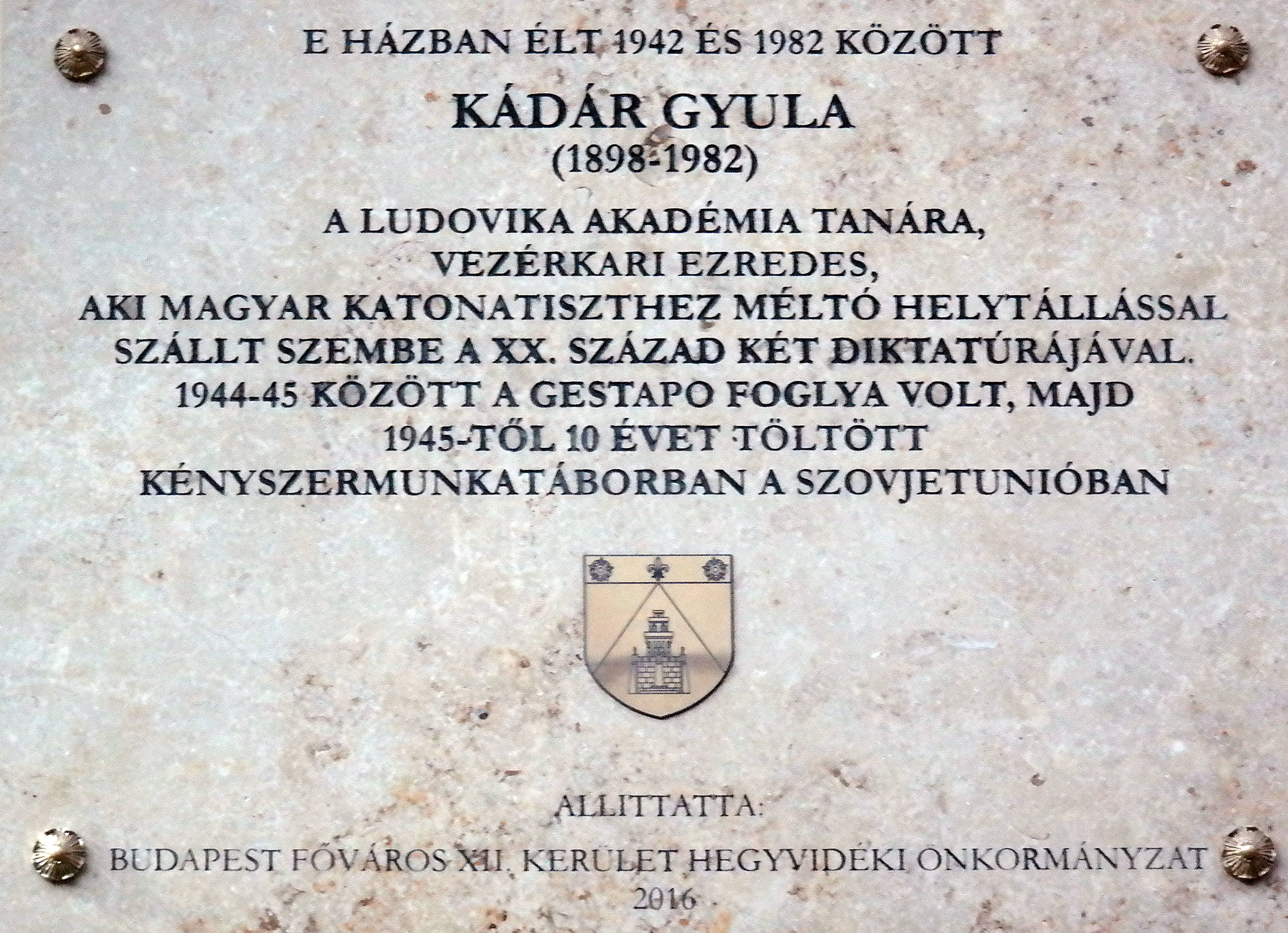 Kádár Gyula emléktáblája (Budapest, XII. kerület, Márvány utca 33.) Felirata: E házban élt 1942 és 1982 között Kádár Gyula (1892–1982) a Ludovika Akadémia tanára, vezérkari ezredes, aki magyar katonatiszthez méltó helytállással szállt szembe a XX. század két diktatúrájával. 1944–45 között a Gestapo foglya volt, majd 1945-től 10 évet töltött kényszermunkatáborban a Szovjetunióban Állíttatta: Budapest Főváros XII. Kerület Hegyvidéki Önkormányzat 2016 A táblán az önkormányzat címere is látható.